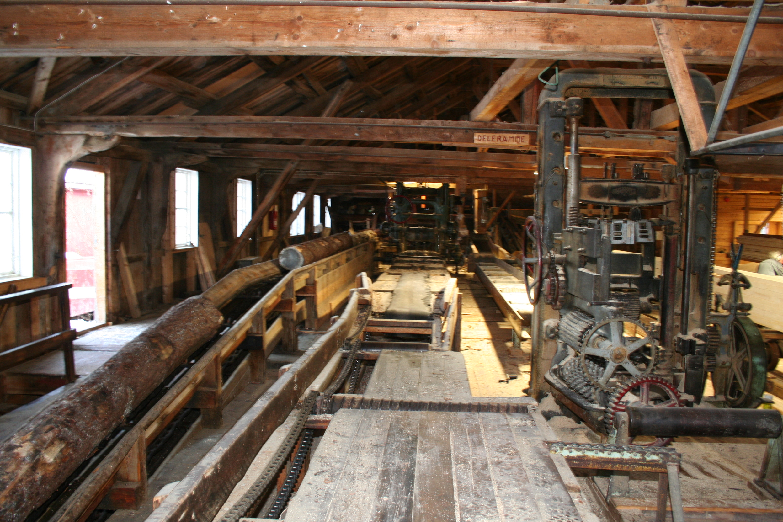 Produksjonslokalet ved Spillum Dampsag & Høvleri